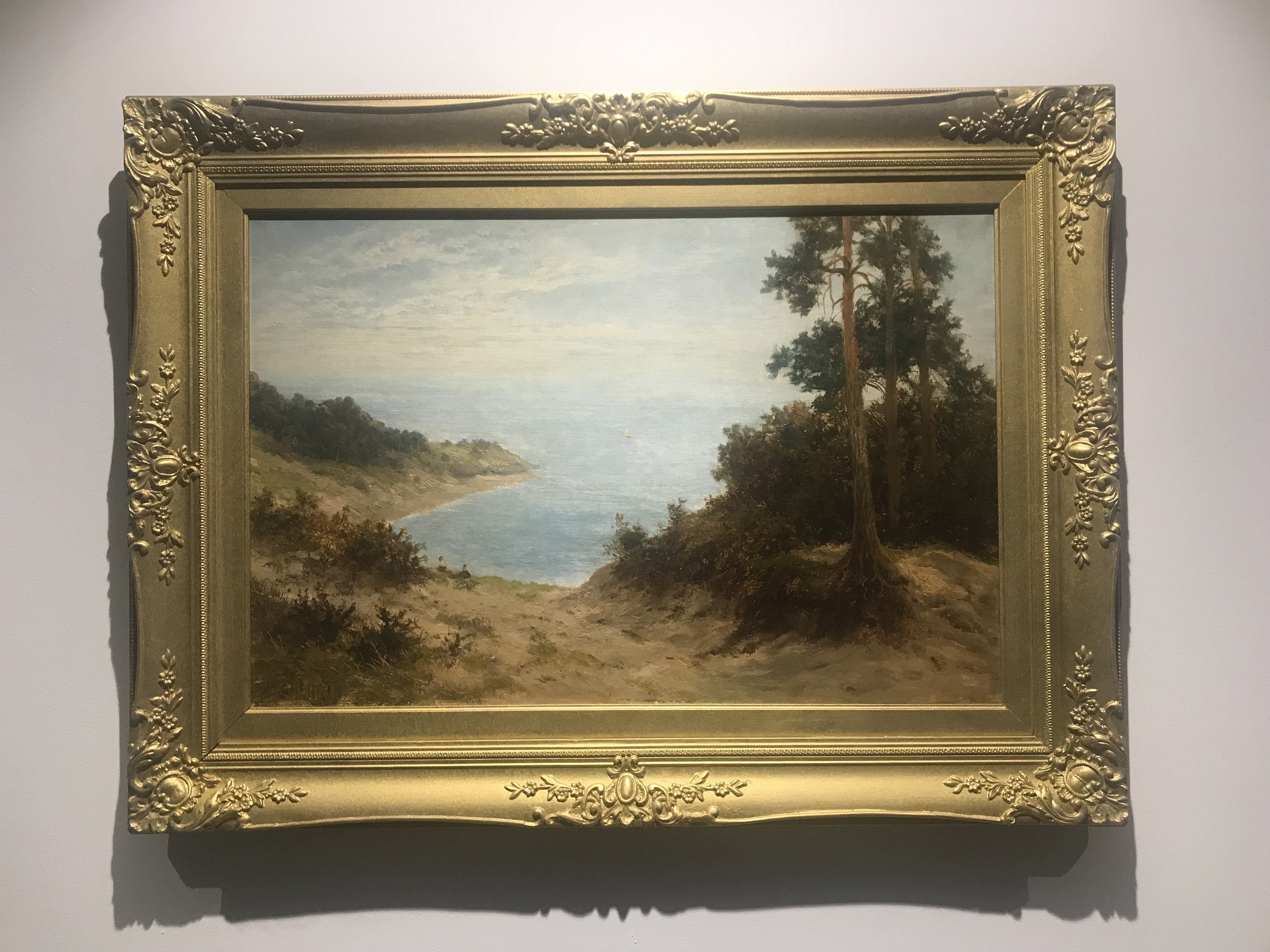 Pobrežie pri Bournemouth